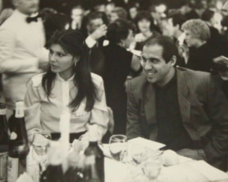 no original description